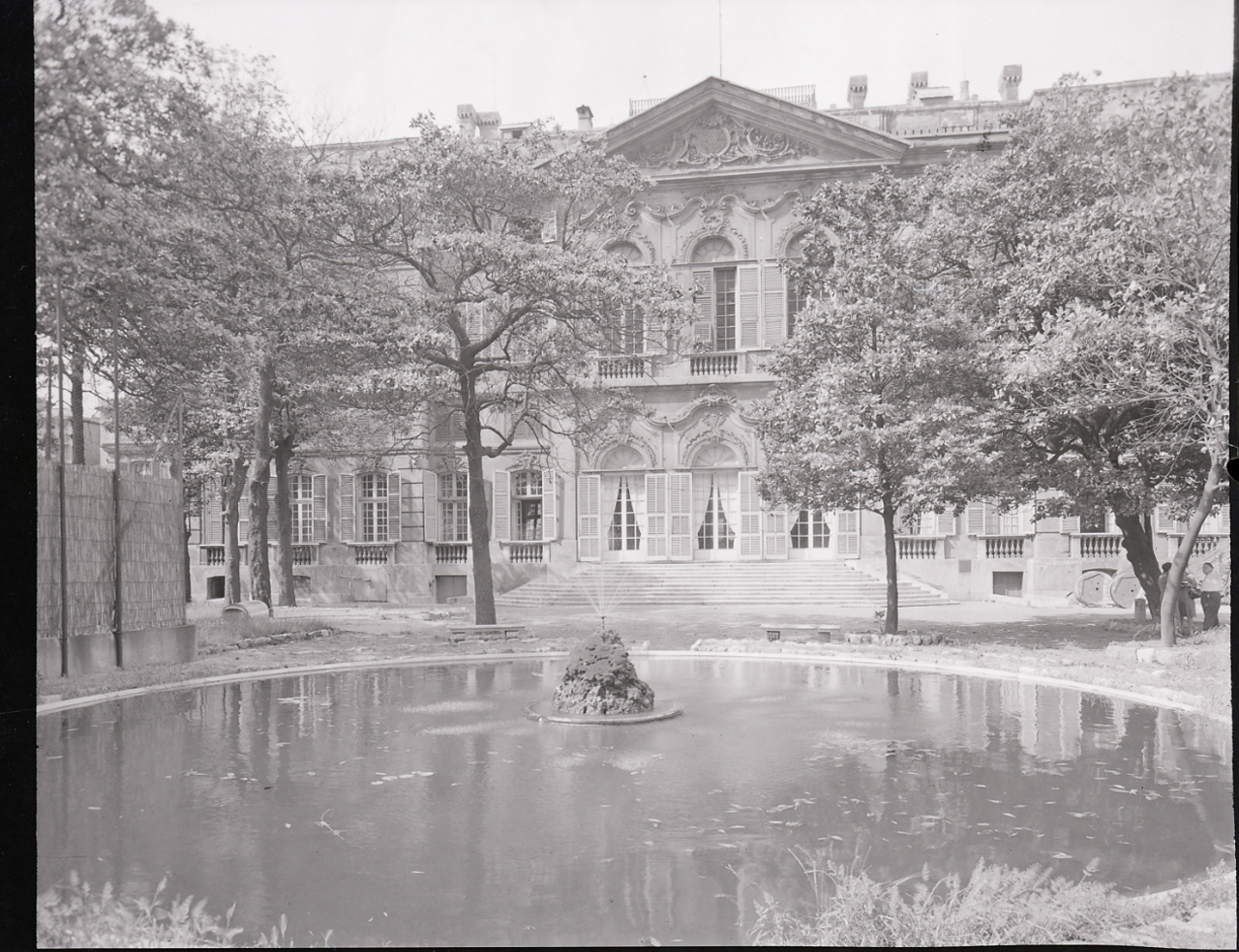 Genova-Cornigliano, Villa Durazzo Bombrini. Servizio fotografico : Genova, 1964 / Paolo Monti. - Buste: 18, Fototipi: 18 : Negativo b/n, gelatina bromuro d'argento/ pellicola ; 10x12. - ((Serie costituita da 18 buste sciolte di negativi identificati con i nn.: 8148, 8149, 8150, 8151, 8205, 8206, 8207, 8208, 8209, 8210, 8211, 8212, 8213, 8214, 8215, 8216, 8217, 8218. - Il negativo identificato con il numero 46397 è stato realizzato per Zodiac. - Occasione: Documentazione per la pubblicazione: Italia Nostra (a cura di), "Le ville genovesi", catalogo della mostra, Genova 1962, Genova, Comune di Genova, 1967. - Fonte: Monografia di Italia Nostra (a cura di): Le ville genovesi, catalogo della mostra, Genova 1962, Genova, Comune di Genova (1967). - Fonte: Lettera di Paolo Monti: I. Carteggi/ Genova - Enrico (1963-1966), presso Archivio Paolo Monti. Camicia con documenti dattiloscritti e manoscritti vari relativi al lavoro eseguito per Italia Nostra: preventivi, lettere, inventari. - Fonte: Rubrica di Paolo Monti: Archivio fino 1-4-1961/ 31-3-1963 (1961-1963), presso Archivio Paolo Monti. - Fonte: Agenda di Paolo Monti: R 1 - Monti/ 1 aprile 1963 - 6 giugno 1964/ 6000-8193 (1963-1964), presso Archivio Paolo Monti